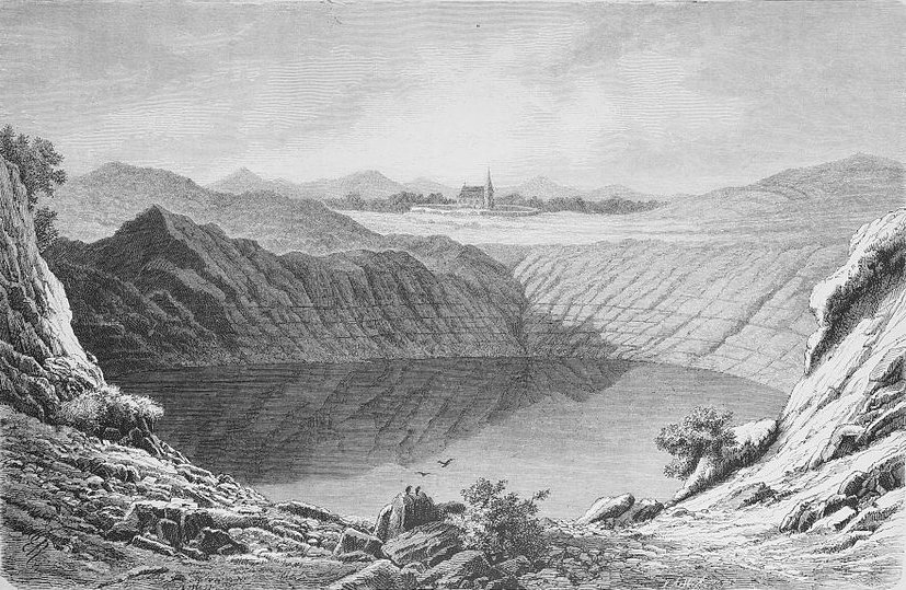 Das Weinfelder Maar auf der Eifel.